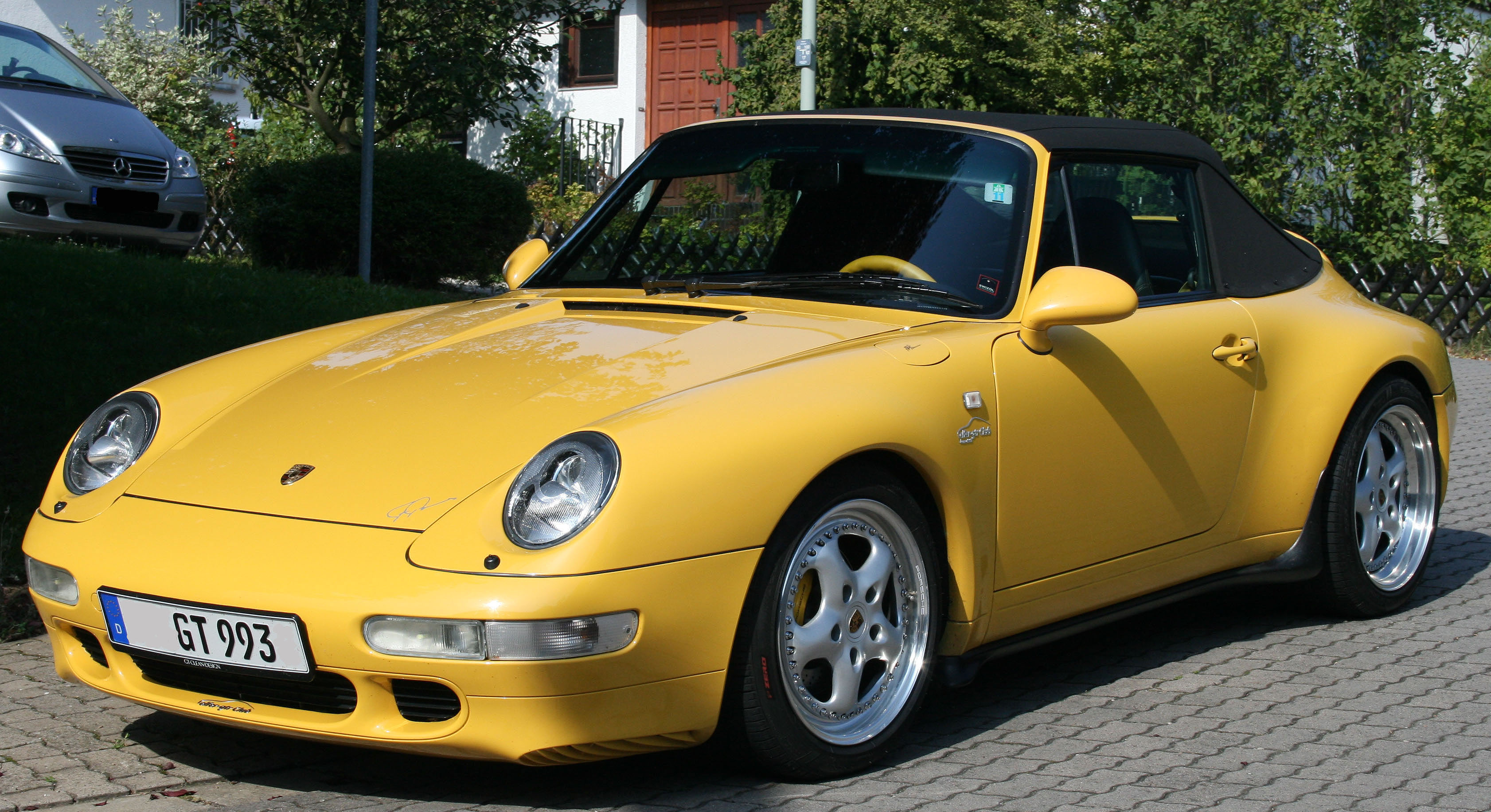 Porsche 911 Carrera 4 Cabrio